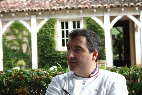 Photo de Vincent Arnould